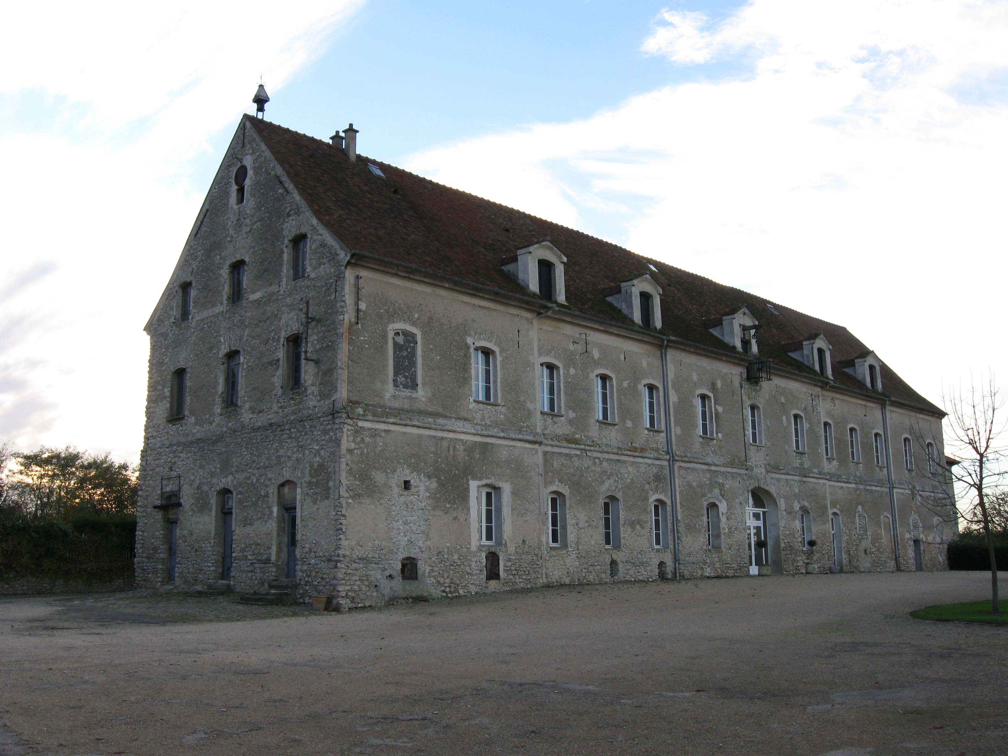 Grange dîmière de Saint-Mesmes. (département de la Seine-et-Marne, région Île-de-France).